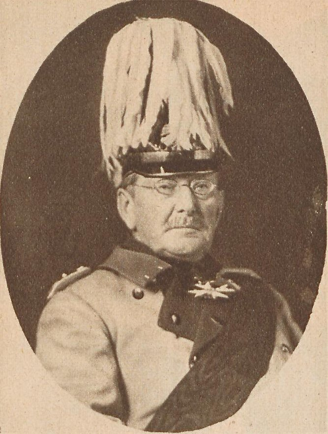 Generalfeldmarschall Freiherr von der Goltz-Pascha